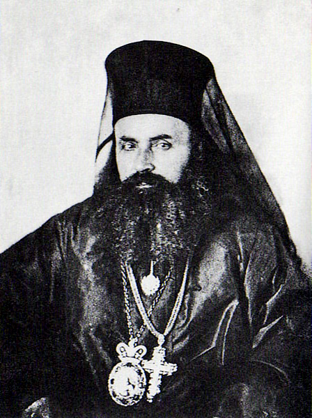 Митрополит Петр (Йованович)